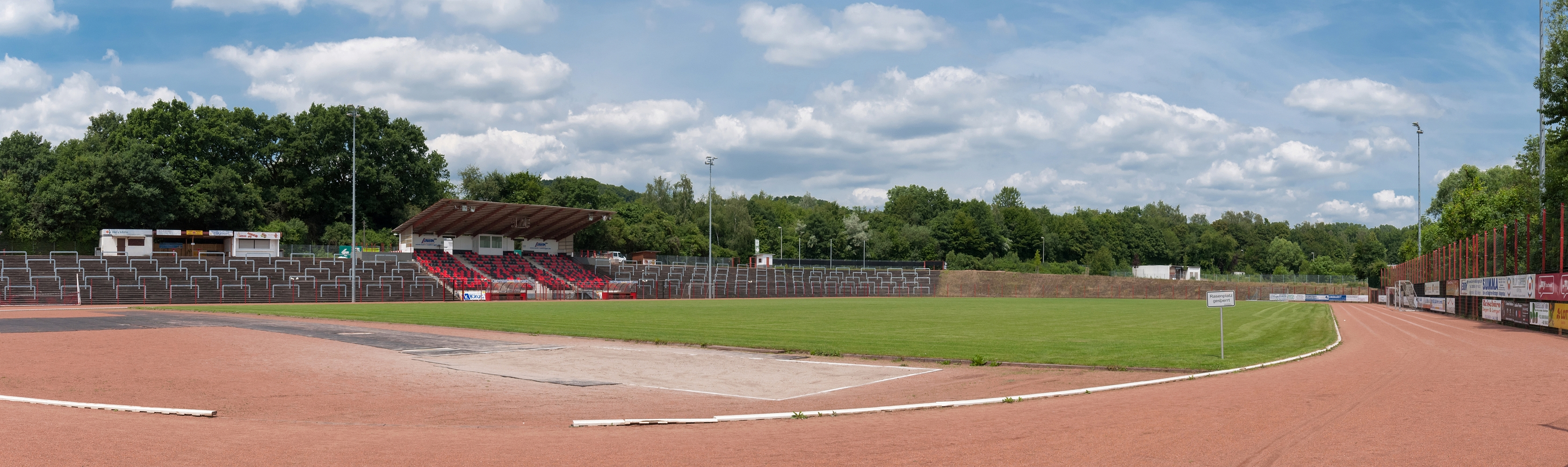 Das Hermann-Neuberger-Stadion in Völklingen, Saarland.